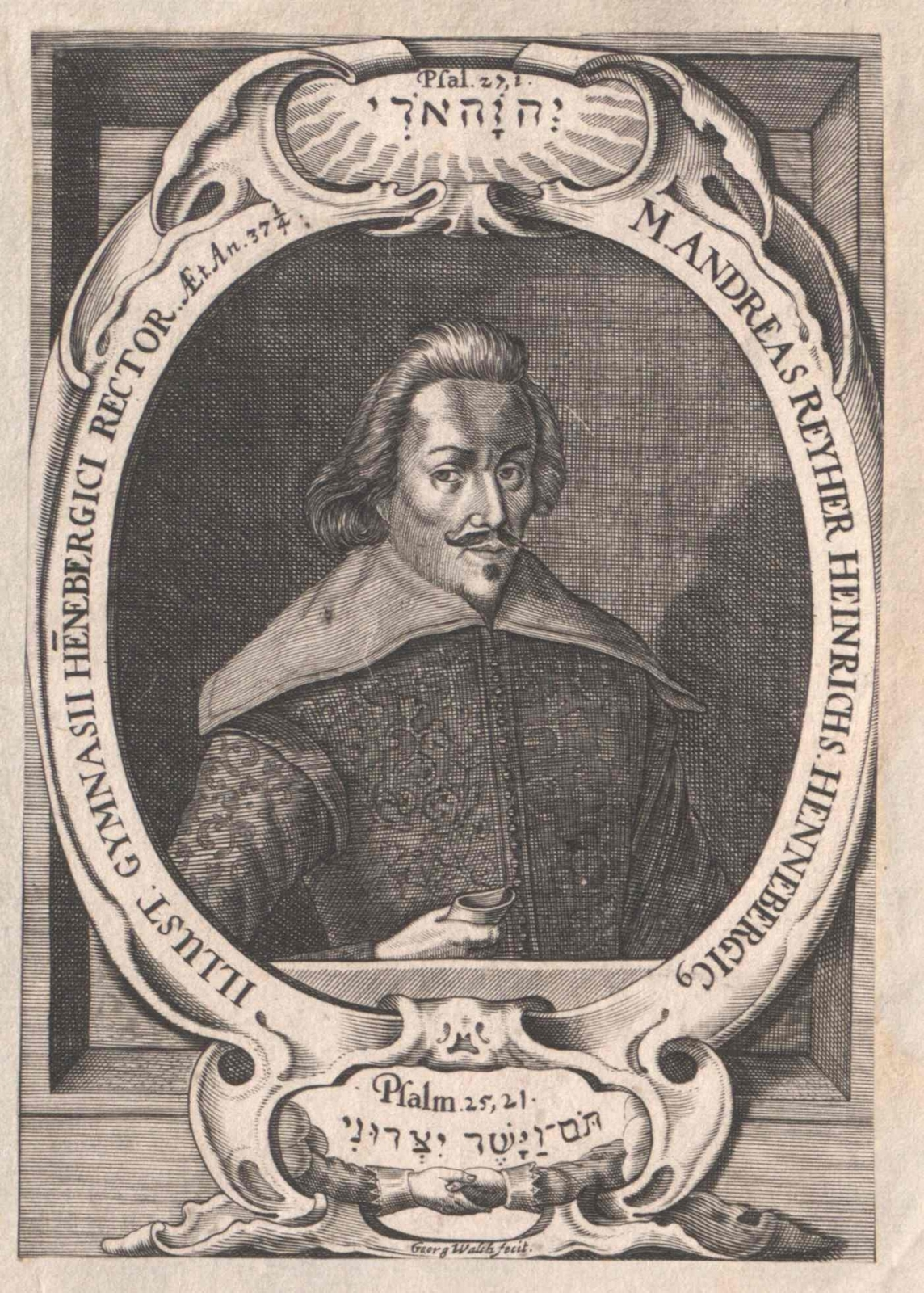 Андреас Рейер